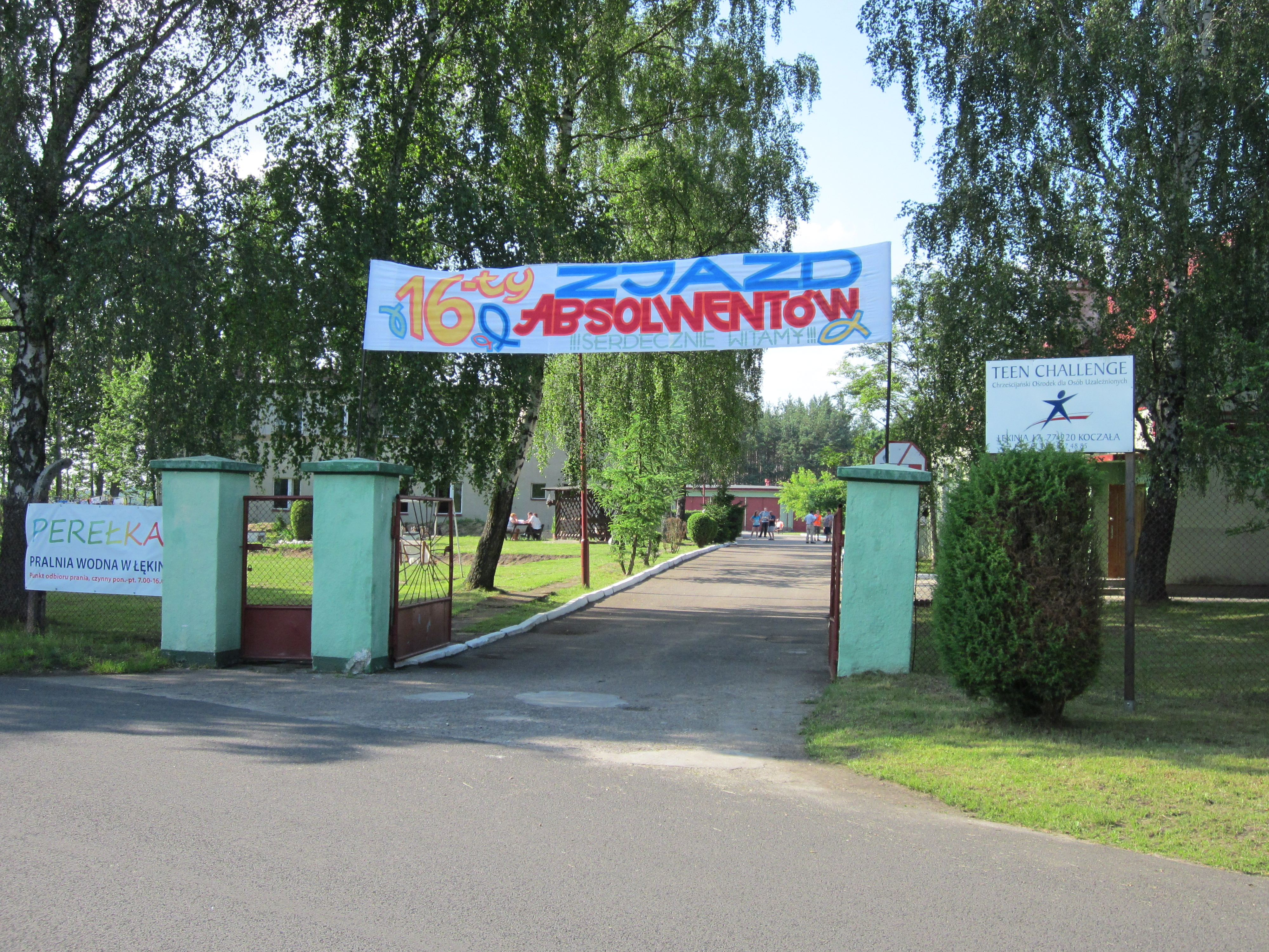 W Łękini znajduje się Chrześcijański Ośrodek dla osób uzależnionych Teen Challenge. W dniach 5-8 lipca 2012 roku odbył się na terenie ośrodka już po raz 16–ty Zjazd Absolwentów.